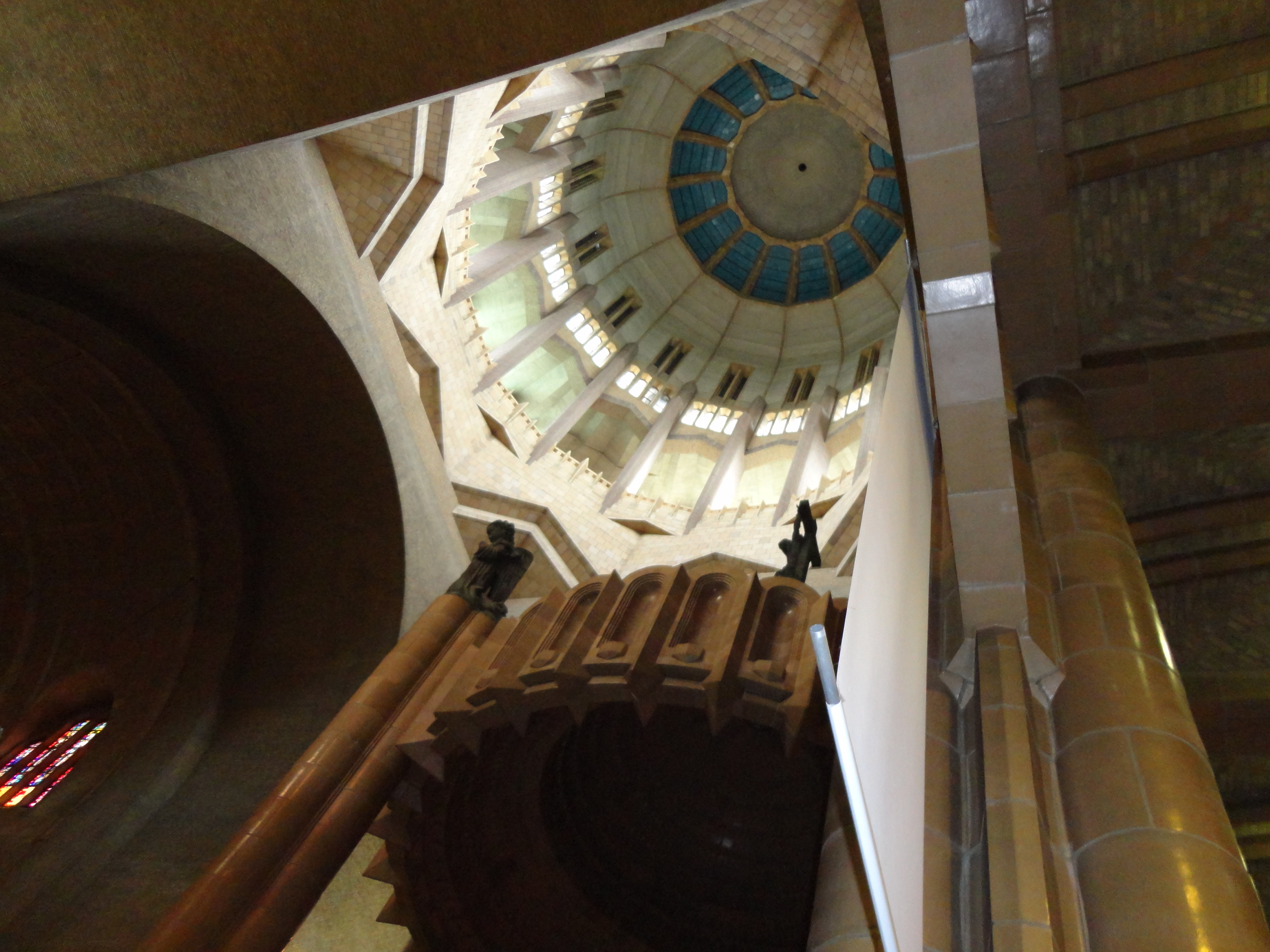 Coupole (vue intérieure) de la Basilique du Sacré-Cœur de Bruxelles. Au premier plan, l'abat-voix de la chaire.